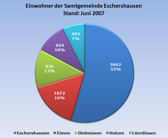 Bevölkerungstatistik: Einwohnerstand der Mitgliedsgemeinden der Samtgemeinde Eschershausen (Landkreis Holzminden) zum 30. Juni 2007 nach Datenstand des Niedersächsischen Landesamtes für Statistik (NLS).